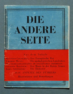 Kriegsflugblatt-Broschüre 16° (13,4 x 10,5 cm), abgeworfen von der Royal Air Force zwischen 23.05.1943 und 23.03.1944. Enthält: Mann, Thomas: Die apokalyptischen. Text einer Hörfunk-Vortrags von 1943.